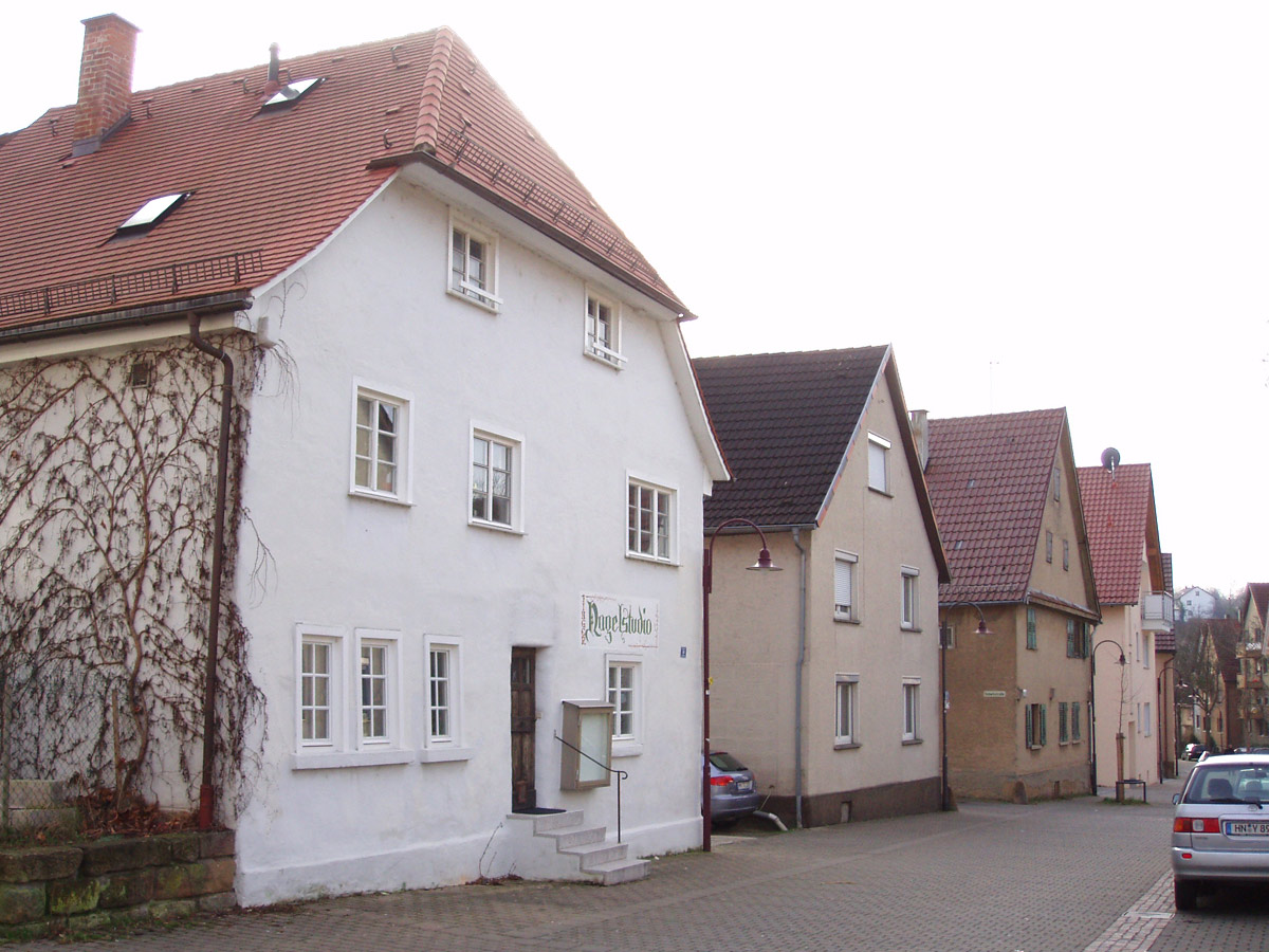 Mittelstraße in Heilbronn-Neckargartach